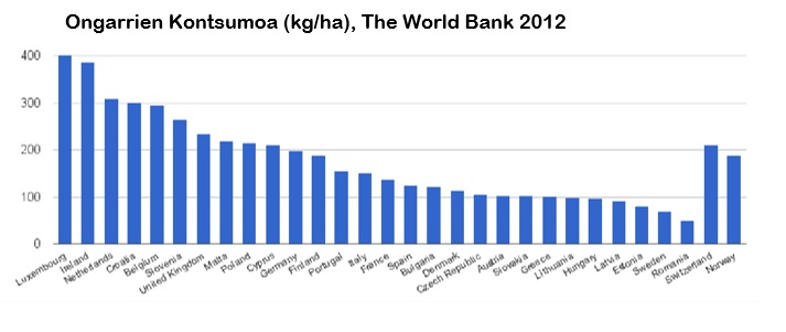 Ongarrien kontsumoa